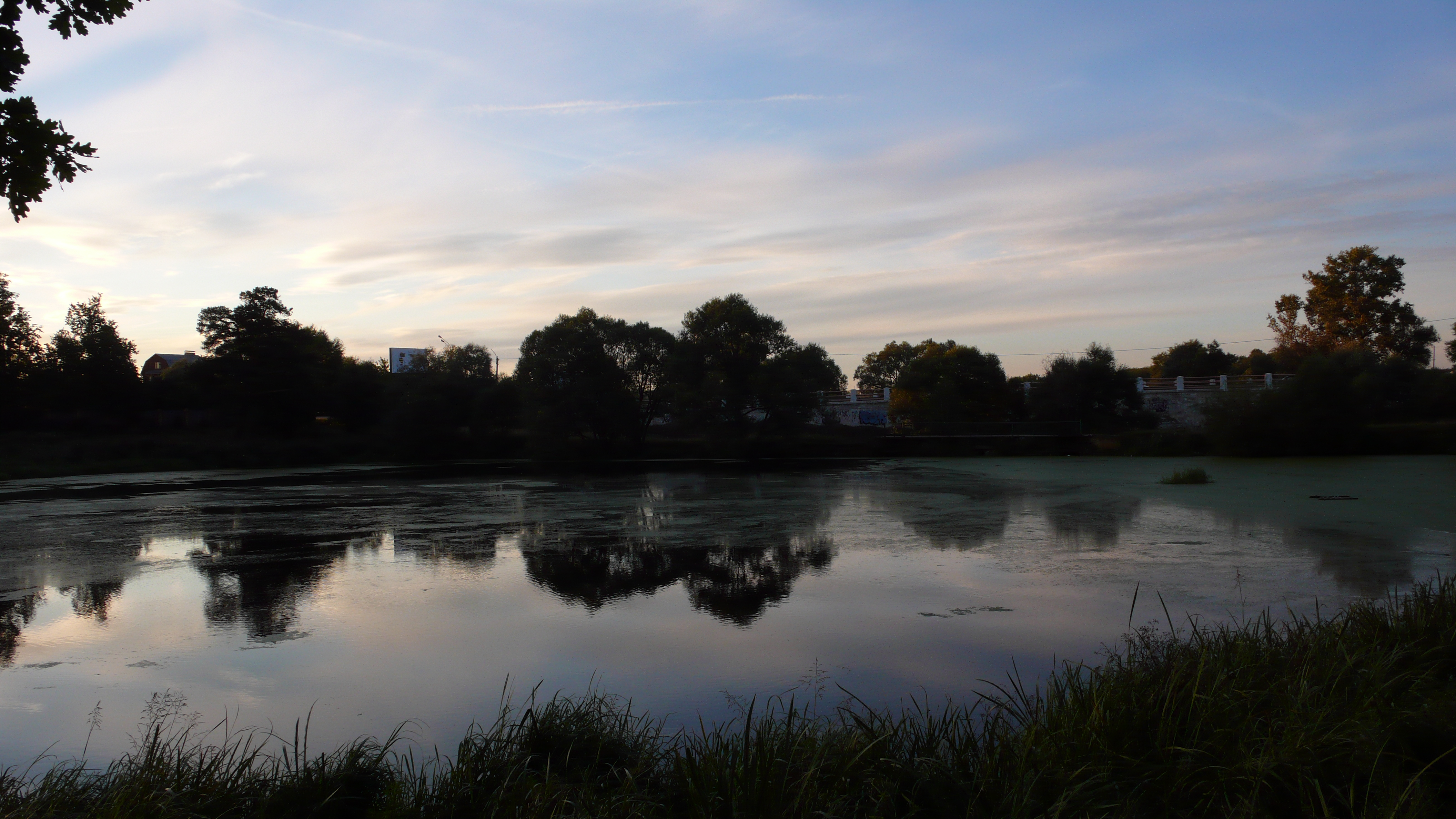 Пруд с плотиной (Москва и Московская область, Голицыно, село Большие Вязёмы)